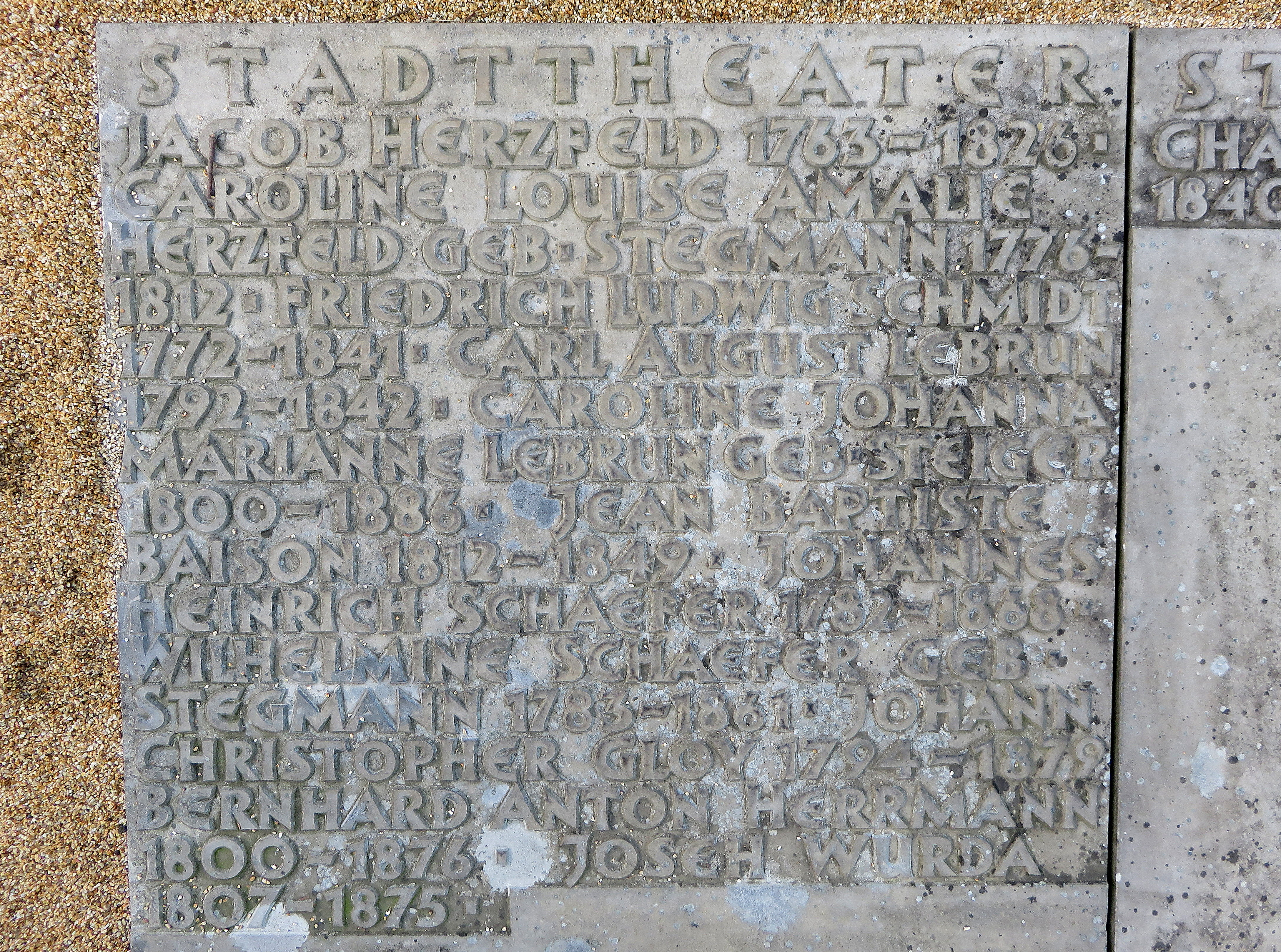 Sammelgrabmal Stadt-Theater im Bereich des Althamburgischen Gedächtnisfriedhofs auf dem Hamburger Friedhof Ohlsdorf zu Ehren von u. a.links: Jacob Herzfeld, Friedrich Ludwig Schmidt, Karl August Lebrun, Jean Baptist Baison, Johann Christopher Gloy, Josef Wurda.rechts: Charlotte Anno geb. Frohn.